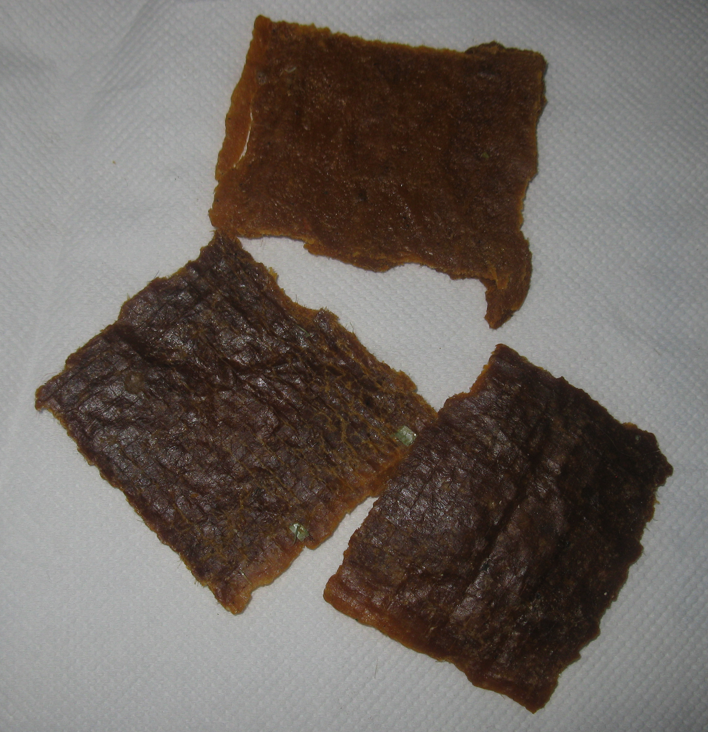 പഴുത്ത മാങ്ങ ഉരലിൽ ഇടിച്ച് ചാറെടുത്ത് പുതിയ തഴപ്പായയിൽ പുരട്ടി ഉണക്കിയെടുക്കുന്നതാണ് മാമ്പഴക്കച്ച്